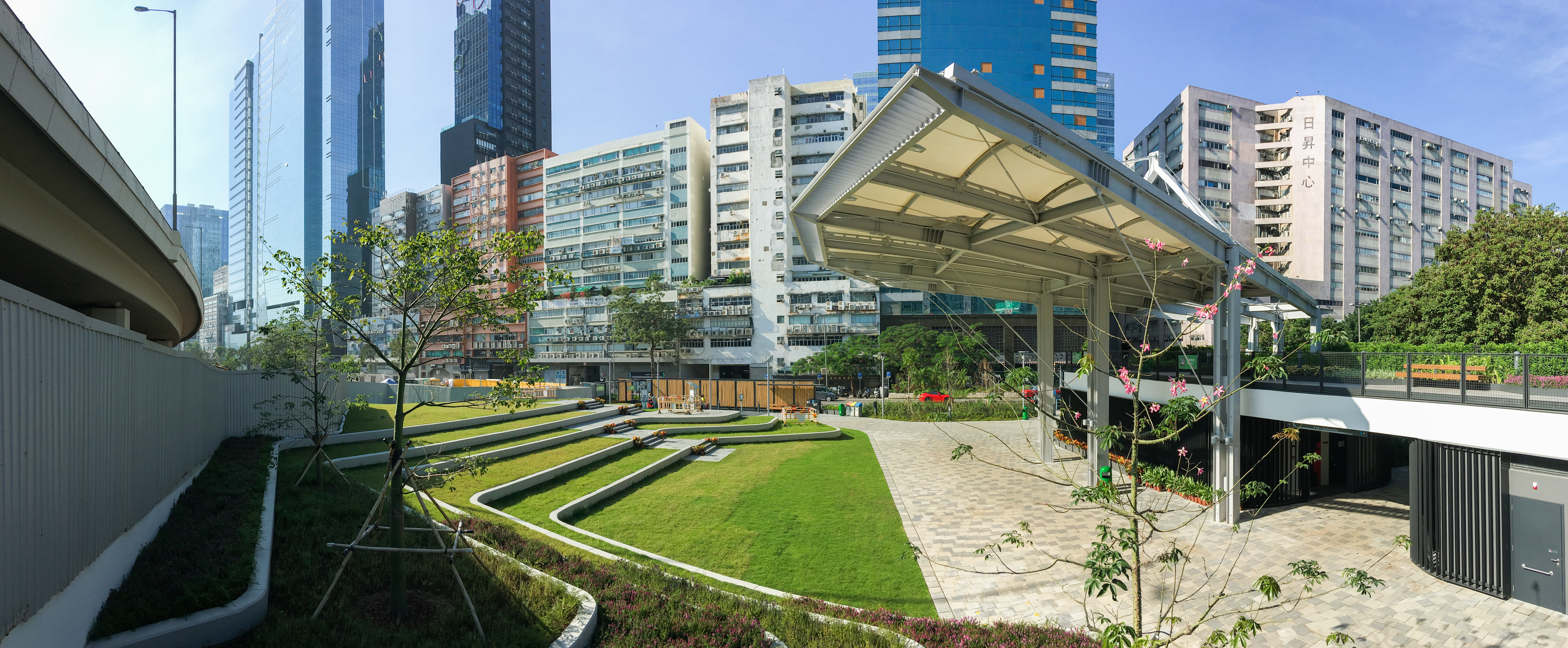 Tsui Ping River Garden Pano